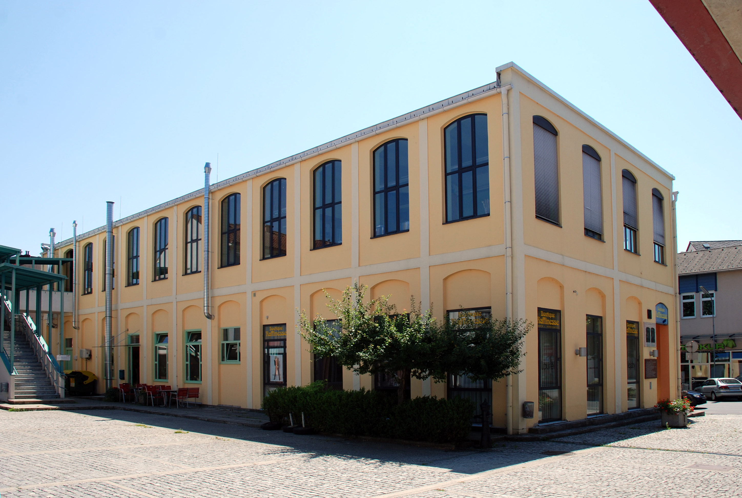 Deutschlandsberg, Steiermark, Österreich: eines der letzten verbliebenen Gebäude der ehemaligen Zündholzfabrik SOLO Deutschlandsberg